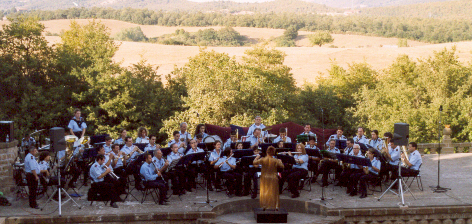 Concerto banda musicale di Monteleone d'Orvieto alla Scarzuola